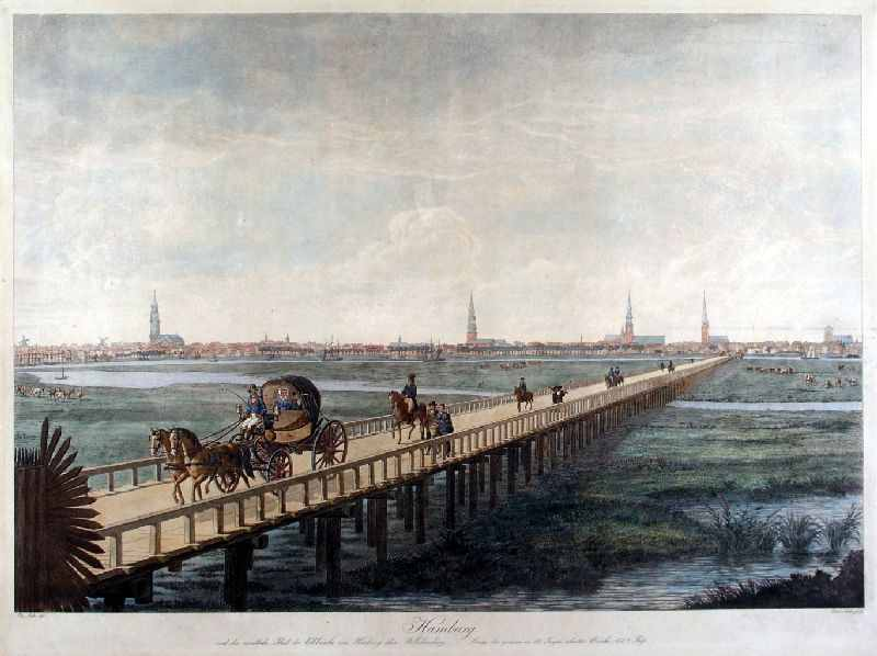 1813 von Marschall Louis-Nicolas Davout von Hamburg über den Grasbrook nach Harburg errichtete Holzbrücke